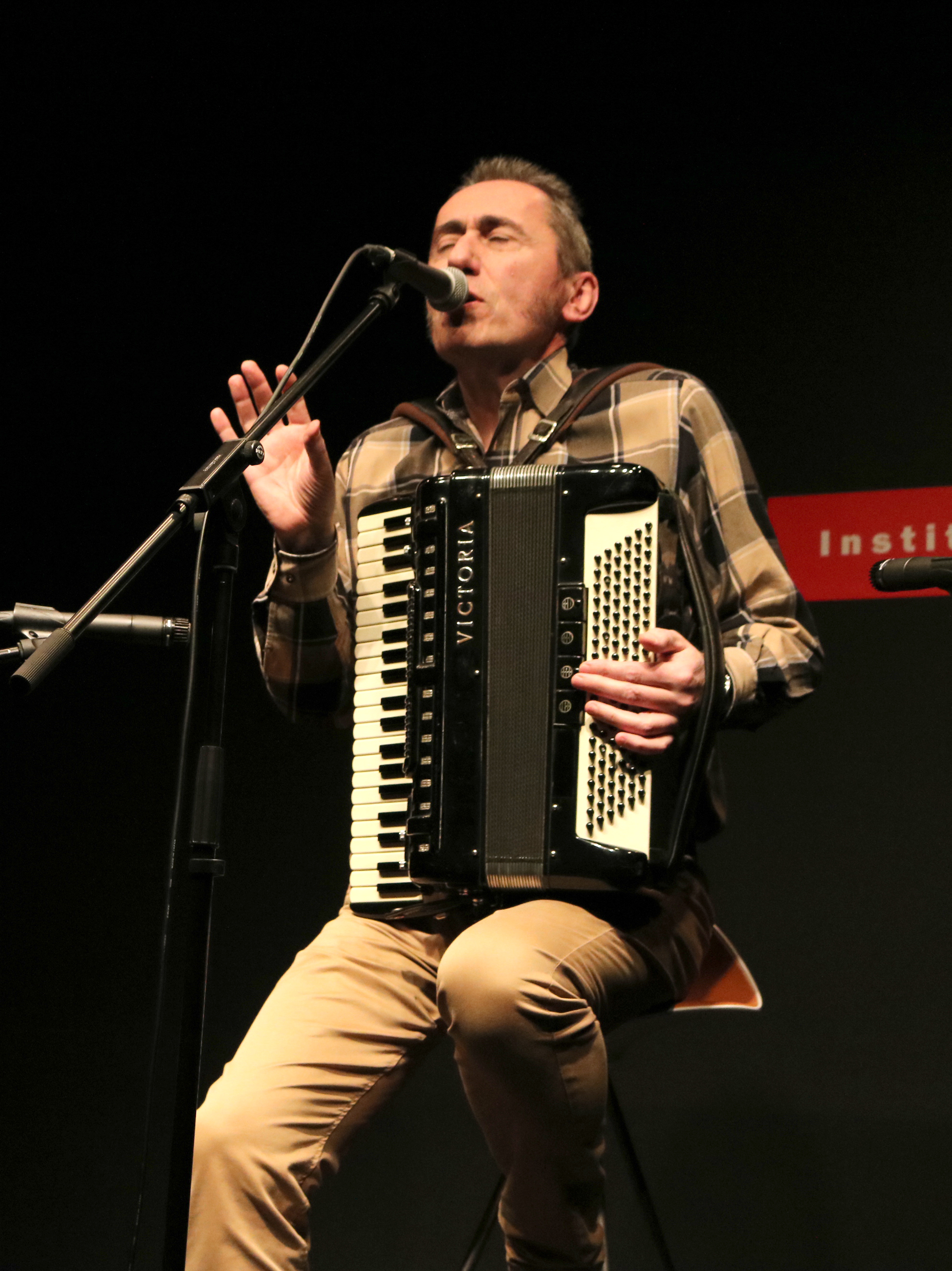 “Tonetti anaiak” (Los hermanos Tonetti) da nombre al último disco de Jabier Muguruza, el que hace el número 14 en su carrera de canción de autor, y que presentará en nuestro centro. A través de un estilo muy cercano al jazz, y acompañado al piano por Mikel Azpiroz el autor nos cantará al oído esas hermosas historias que nos reencuentran con lo más íntimo de nosotros mismos.